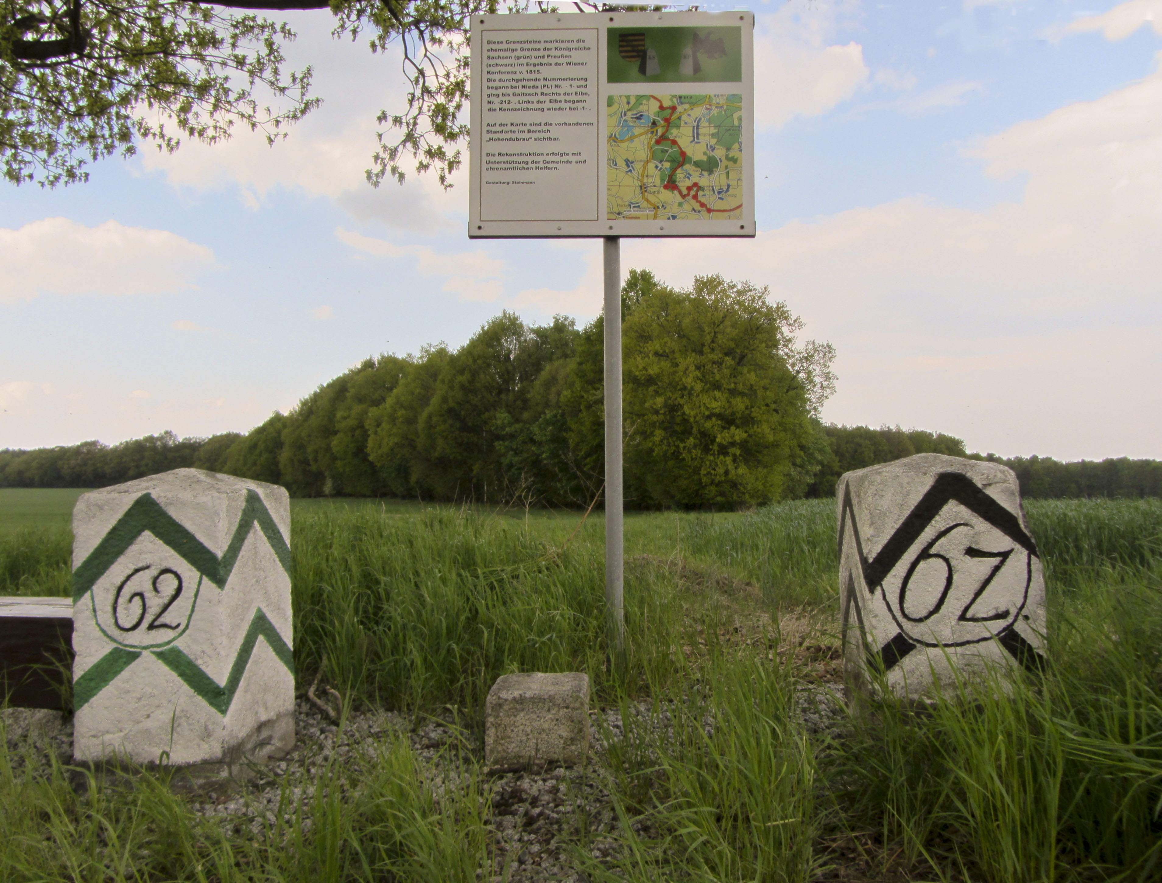 Grenzstein Nr. 62 Historische Landesgrenze Königreich Sachsen Königreich Preußen 1815 (Wiener Kongress) Hornjoserbsce: Historiski saksko-pruski měznik čo. 62 při dróze wot Hbjelska do Hrodźišća